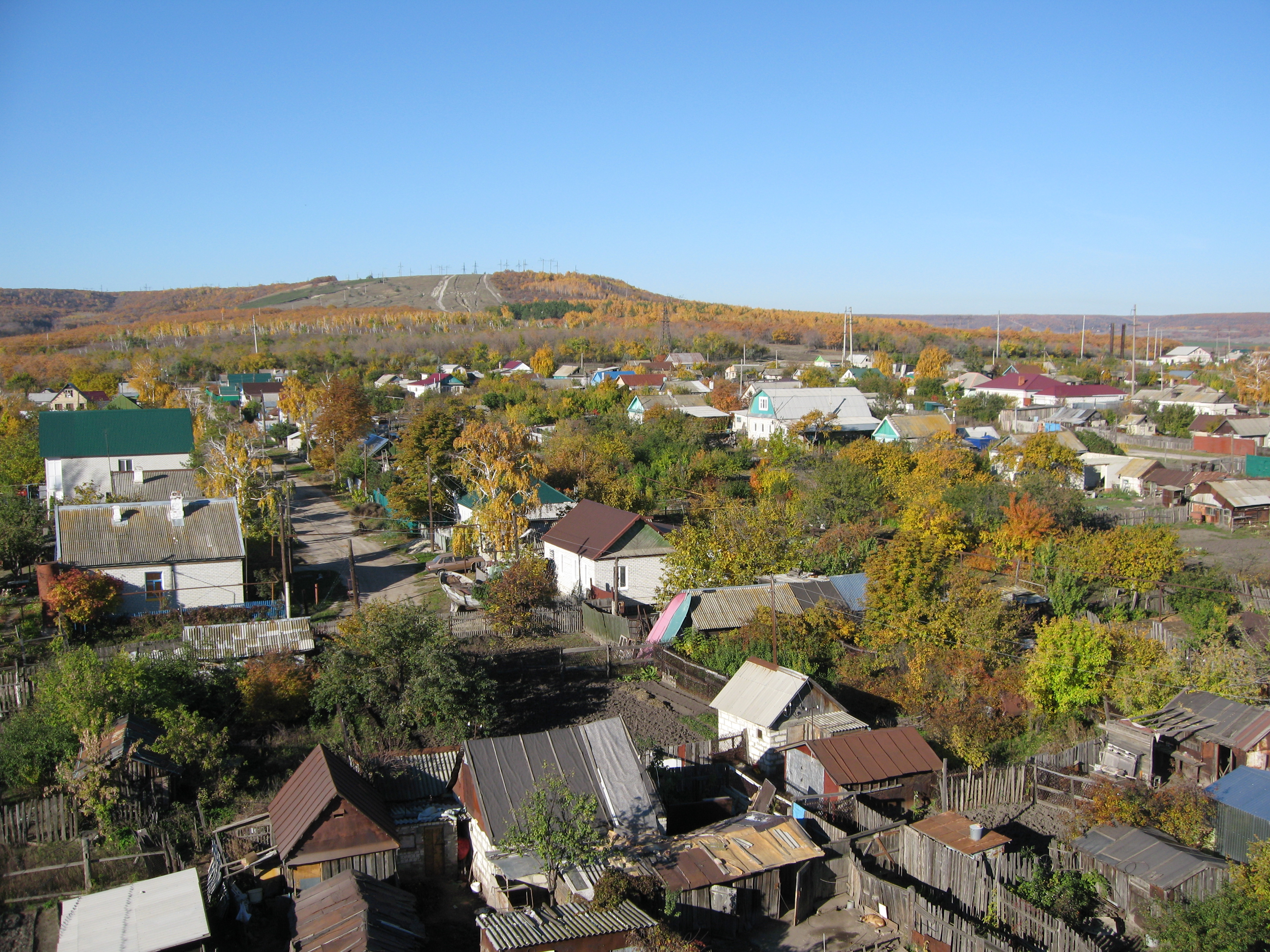 Осень.